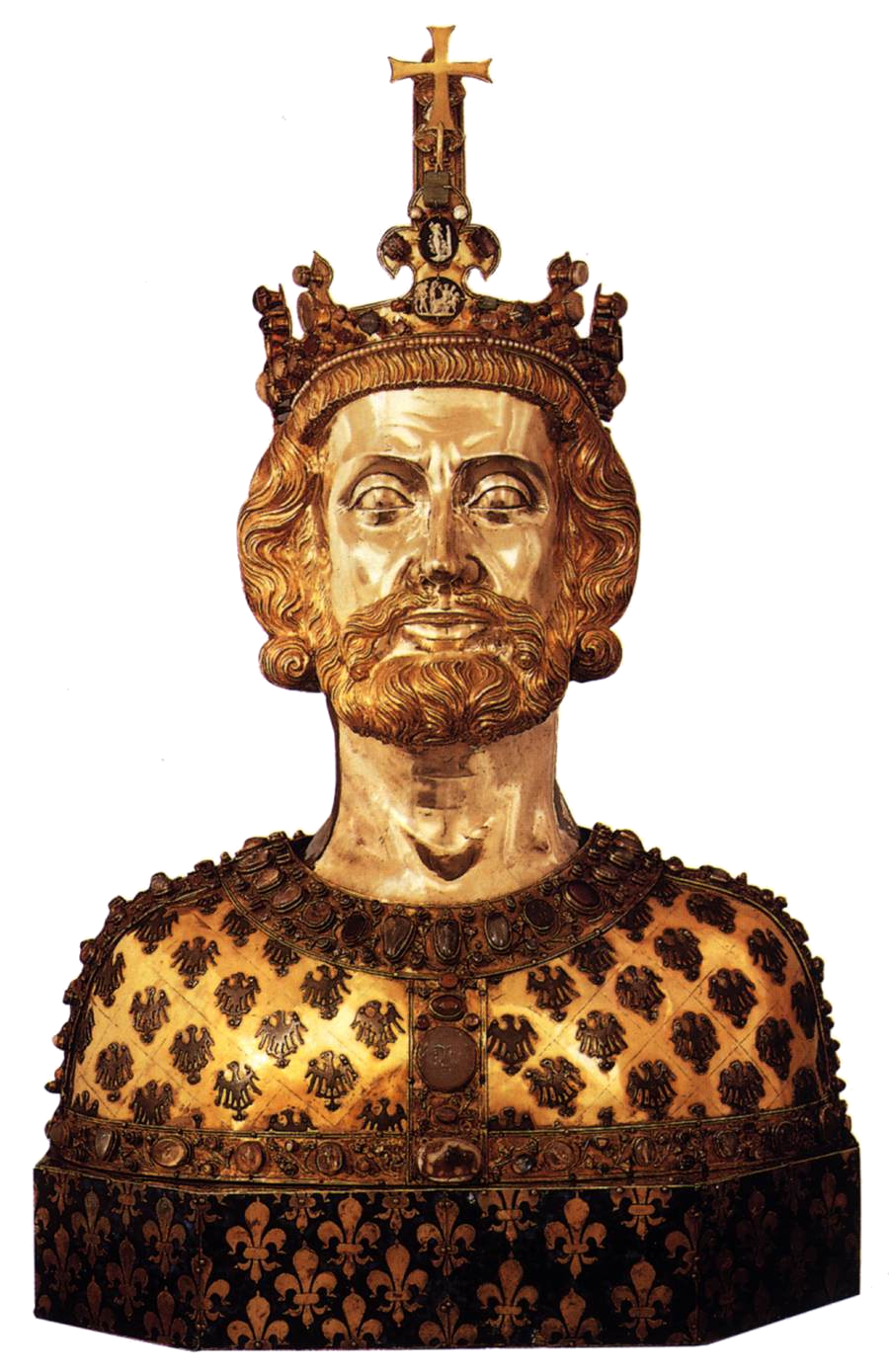 Reliquiarium Caroli Magni